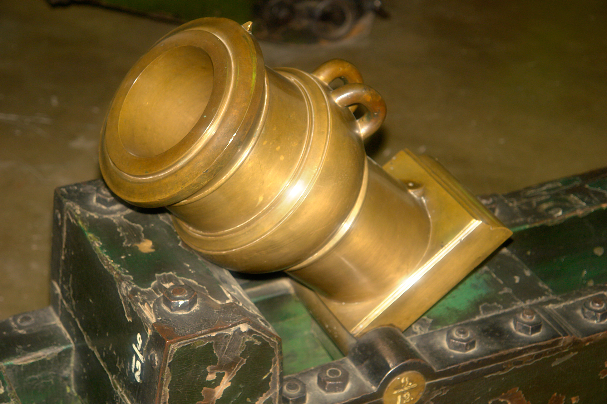 1/4 пудовая (123-мм) опытная мортира. Бронза, 41 см. Масса 73 кг. Отлит в первой четверти XIX в. Станок мортирный образца 1805 г. Военно-исторический музей артиллерии, инженерных войск и войск связи, Санкт-Петербург.